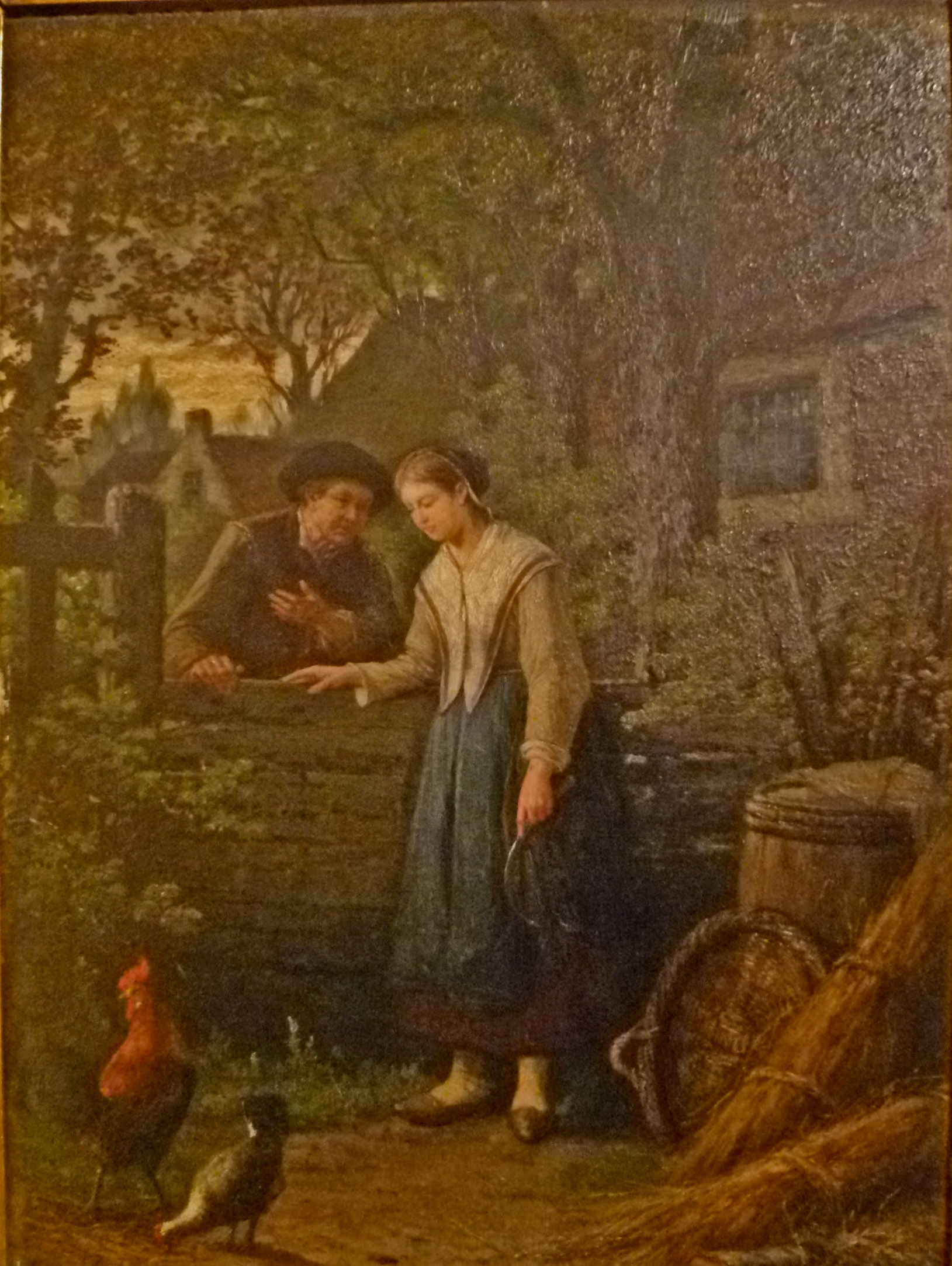 "Jonge boerin met man en kippen", olieverf op paneel (50 x 36 cm) door de Belgische kunstschilder Adriaan de Braekeleer (1818-1904); privébezit